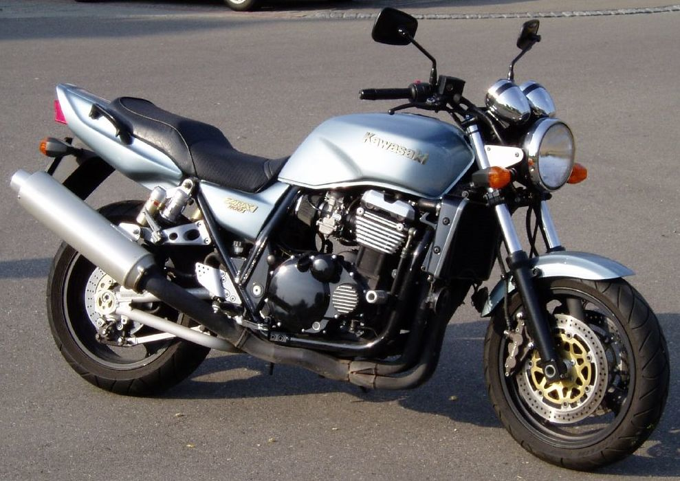 Kawasaki ZRX1100